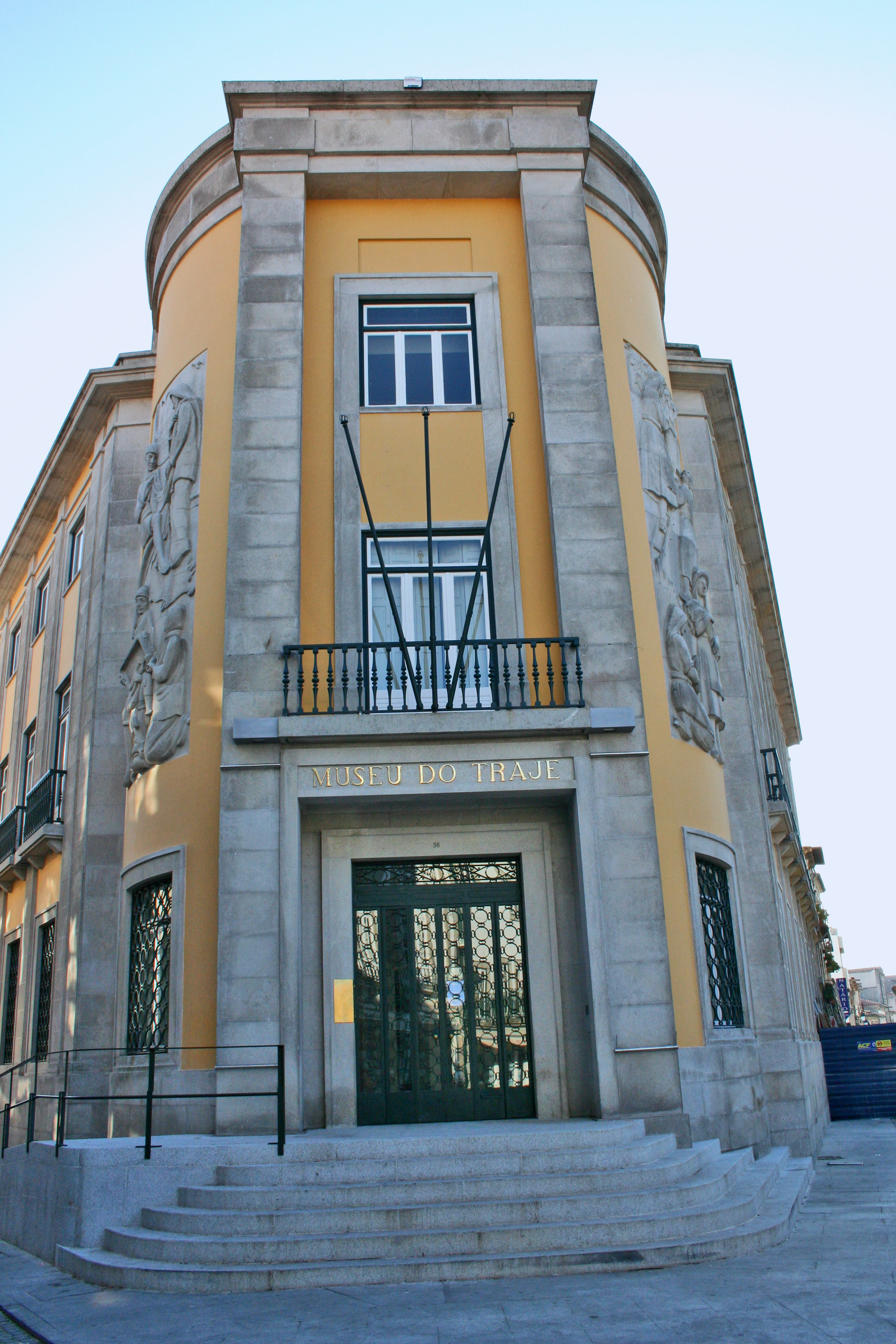 Edifício do antigo Banco de Portugal / Museu do Traje This file was uploaded for Wiki Loves Monuments in Portugal with the unique identifier 97022585.